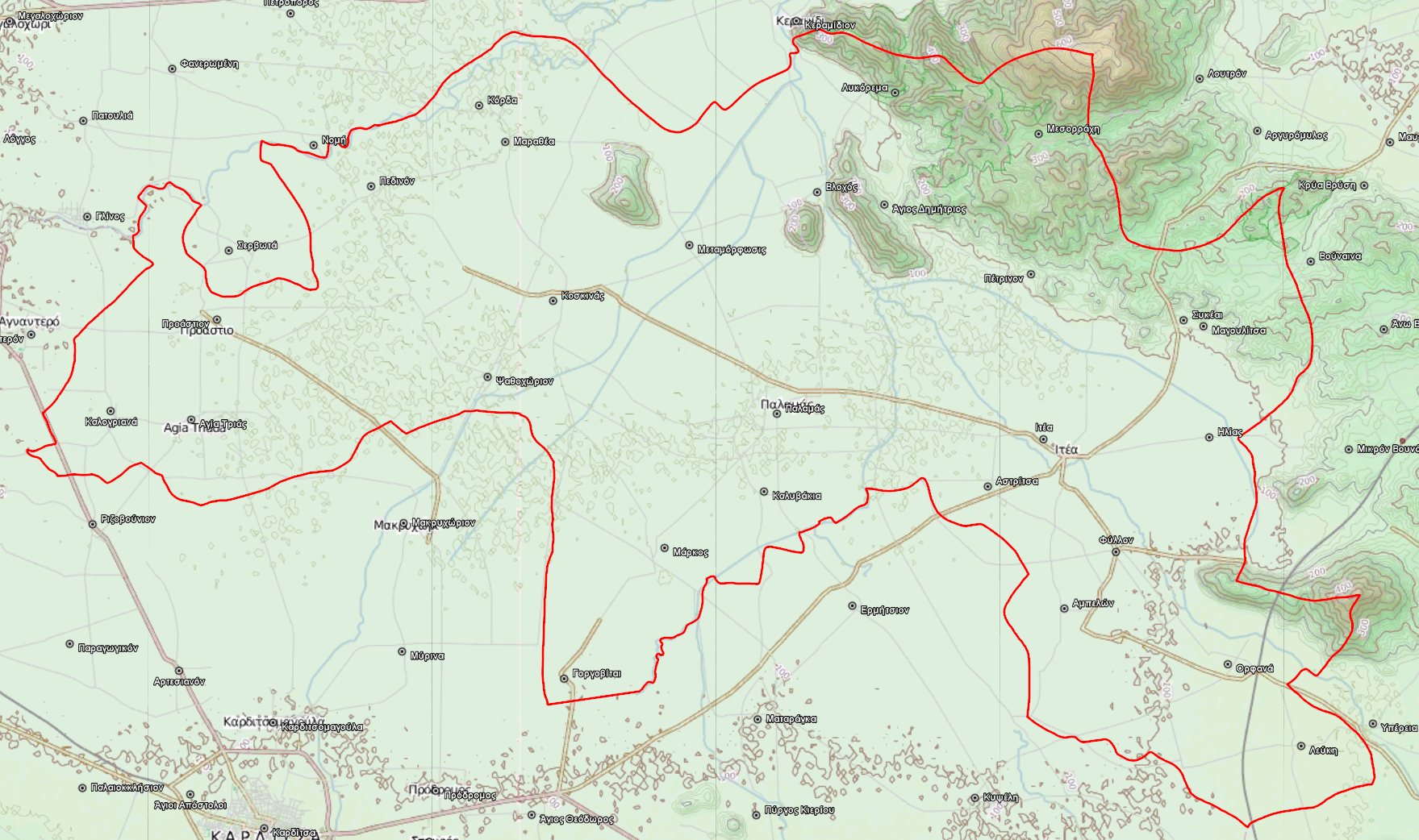 Τοπογραφικός χάρτης του Δήμου Παλαμά